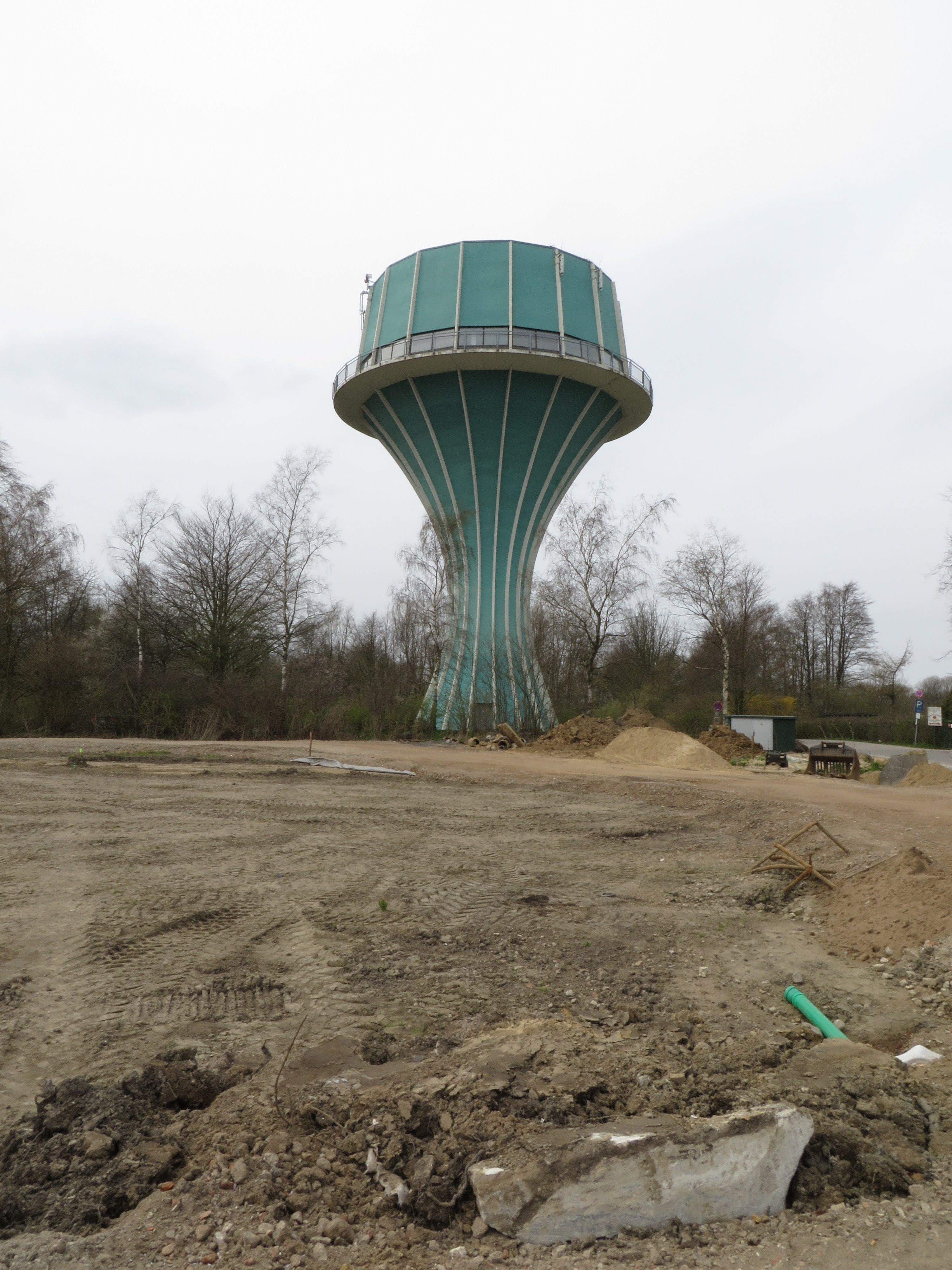 Wasserturm Flensburg-Mürwik am 4. April 2015, Bild 02